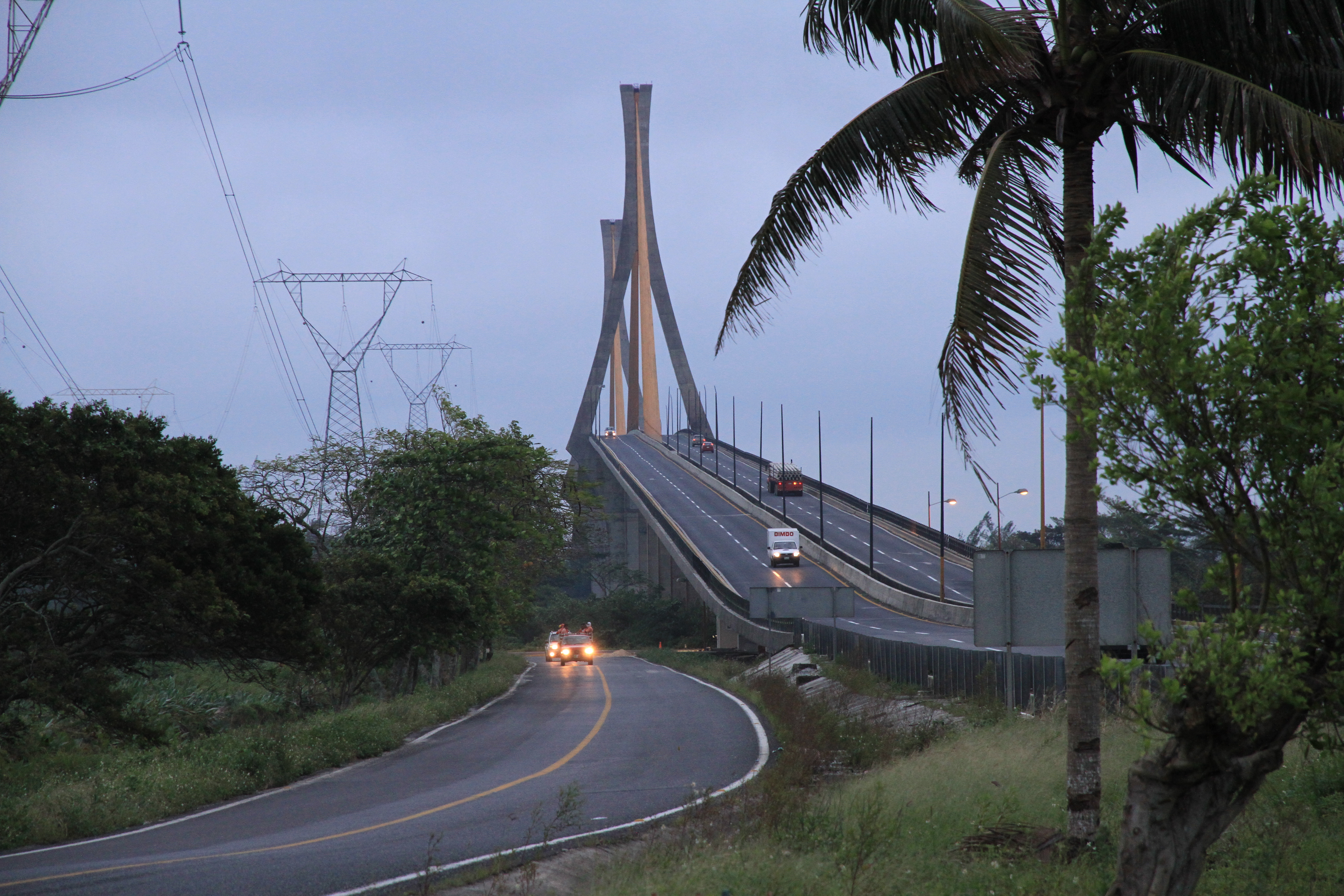 Puente colgante Ing. Antonio Dovalí Jaime (Coatzacoalcos II) en el sur del estado de Veracruz México